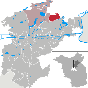 Ziethen in Brandenburg (Country) - District Barnim